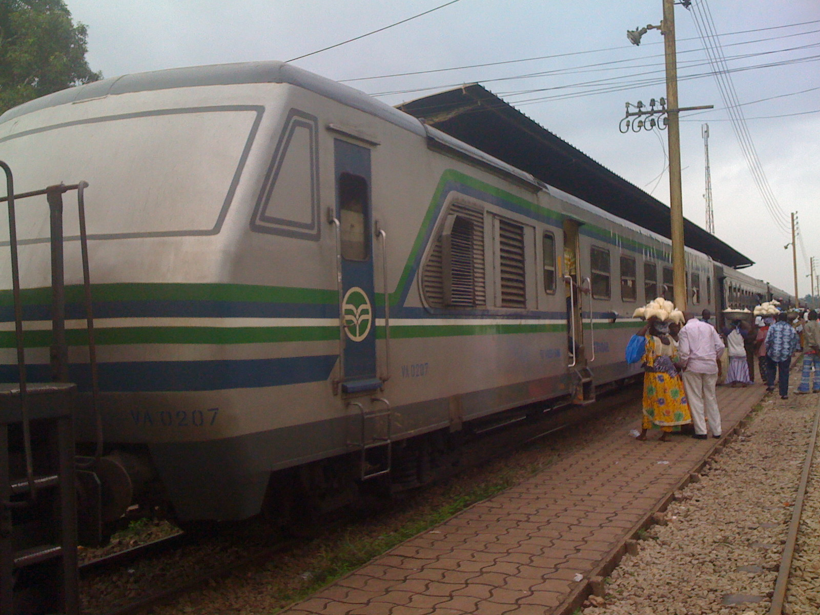 Wagon de luxe pour le transport des voyageurs de la STIB (ex-sitarail), Côte d'Ivoire, Burkina Faso